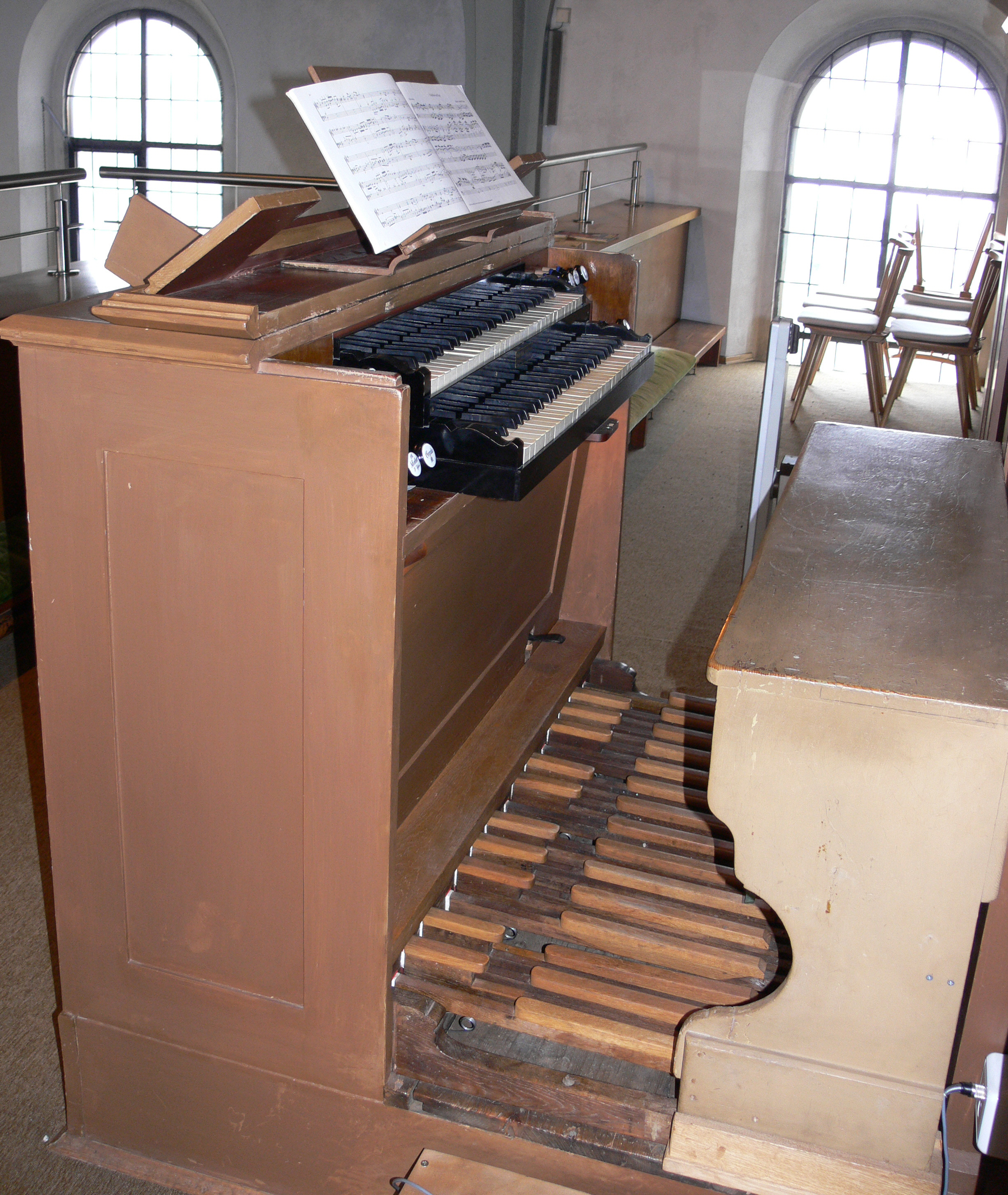 Ravensburg, Schmalegg: Pfarrkirche St. Niklaus, Link-Orgel von 1864, Spieltisch